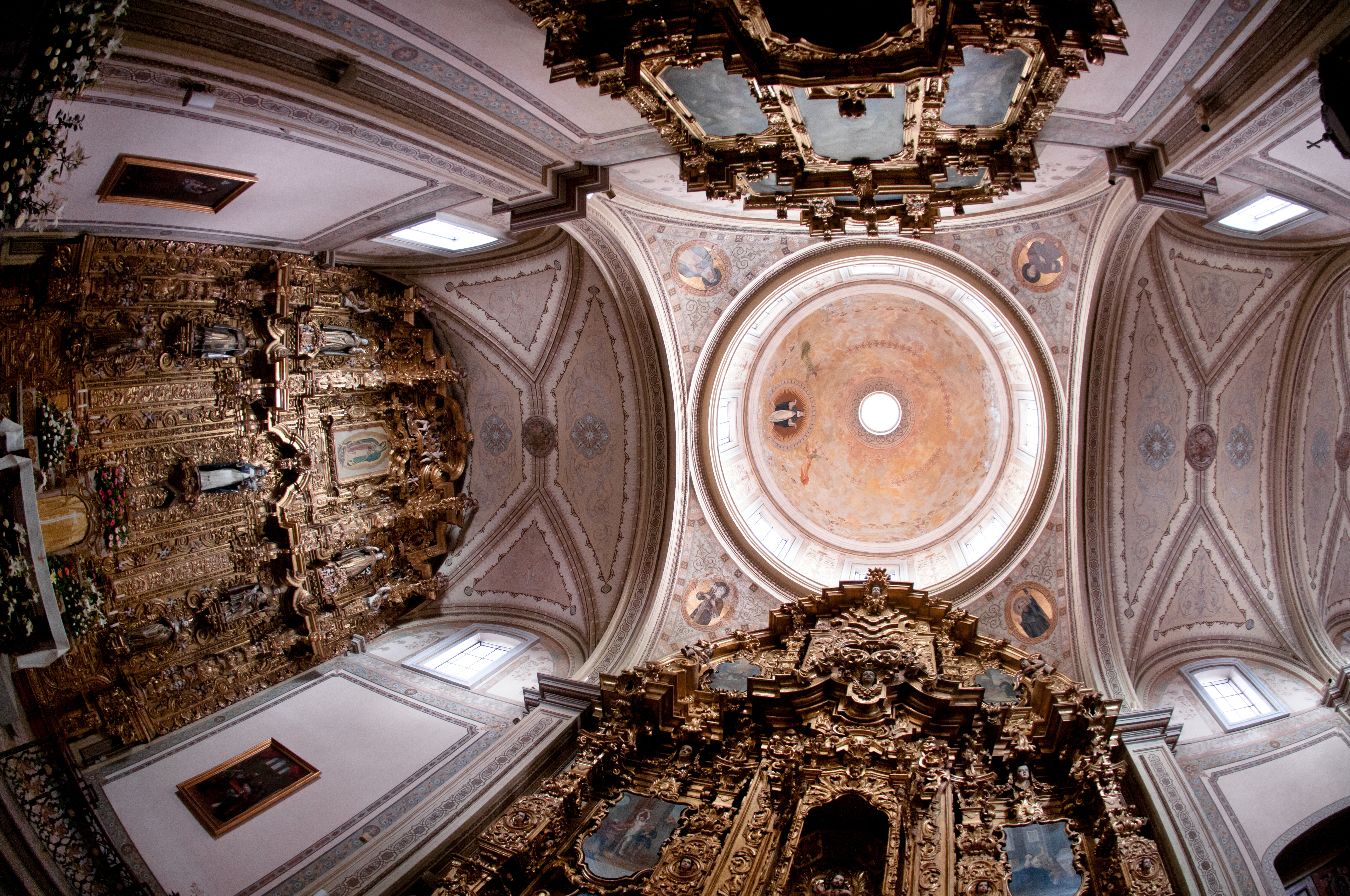 La información sobre este templo es un poco escasa en Internet y no en todos lados coincide. Así que mejor me abstengo de publicar algo sobre este templo poco documentado. Pero está padre y tiene retablos barrocos.